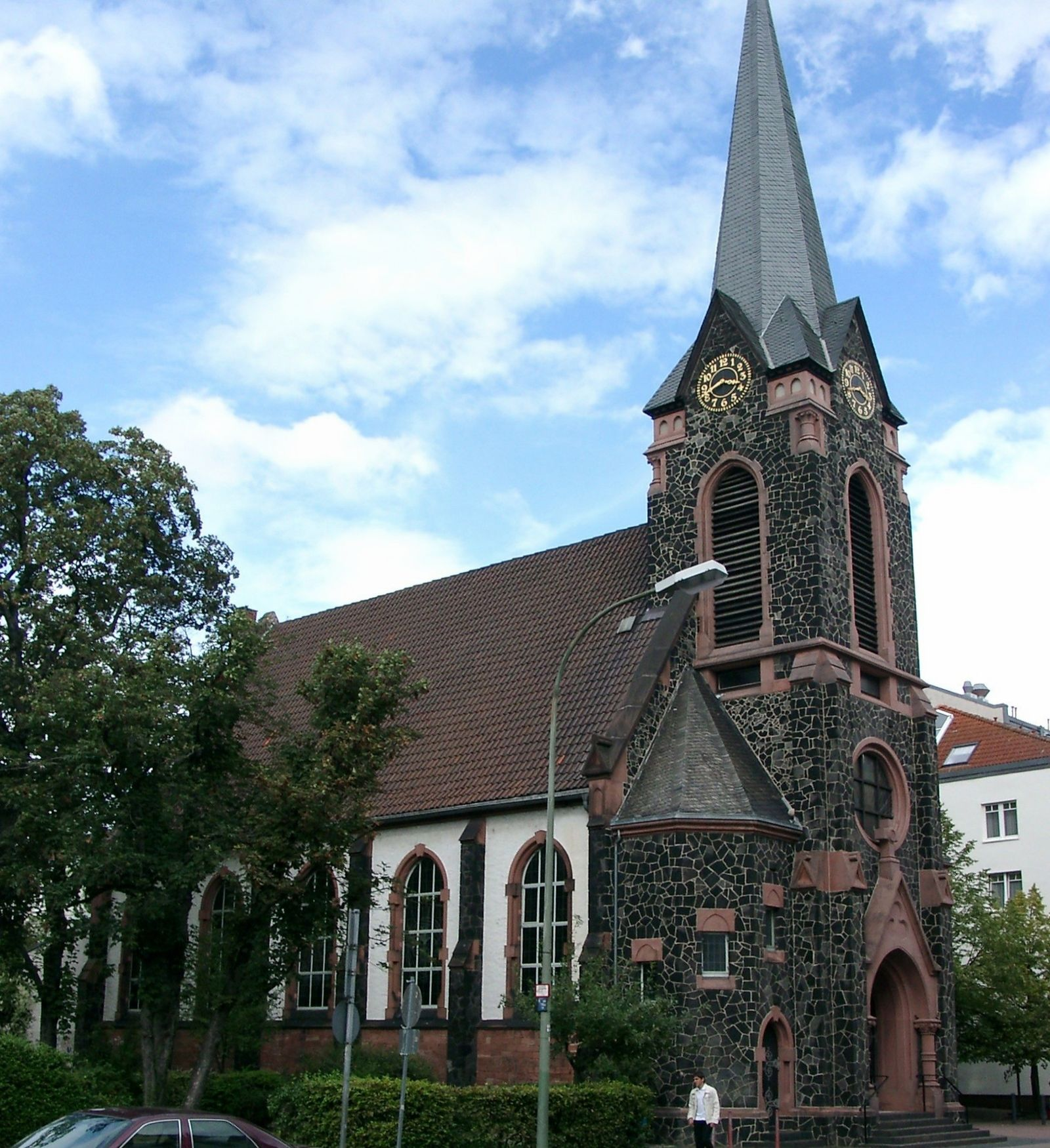 Offenbach am Main, Alt-Katholische Pfarrkirche